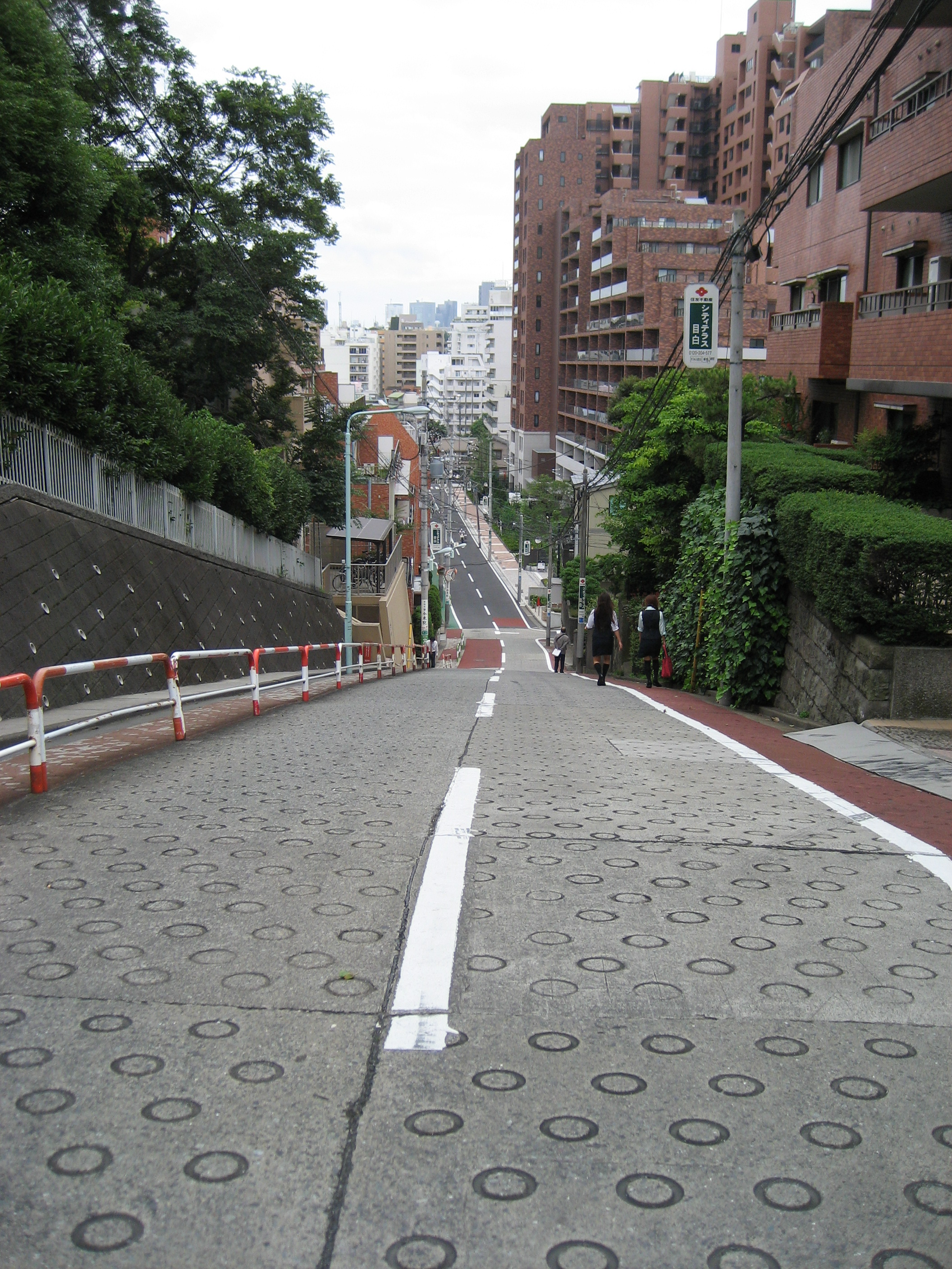 東京都豊島区高田ののぞき坂